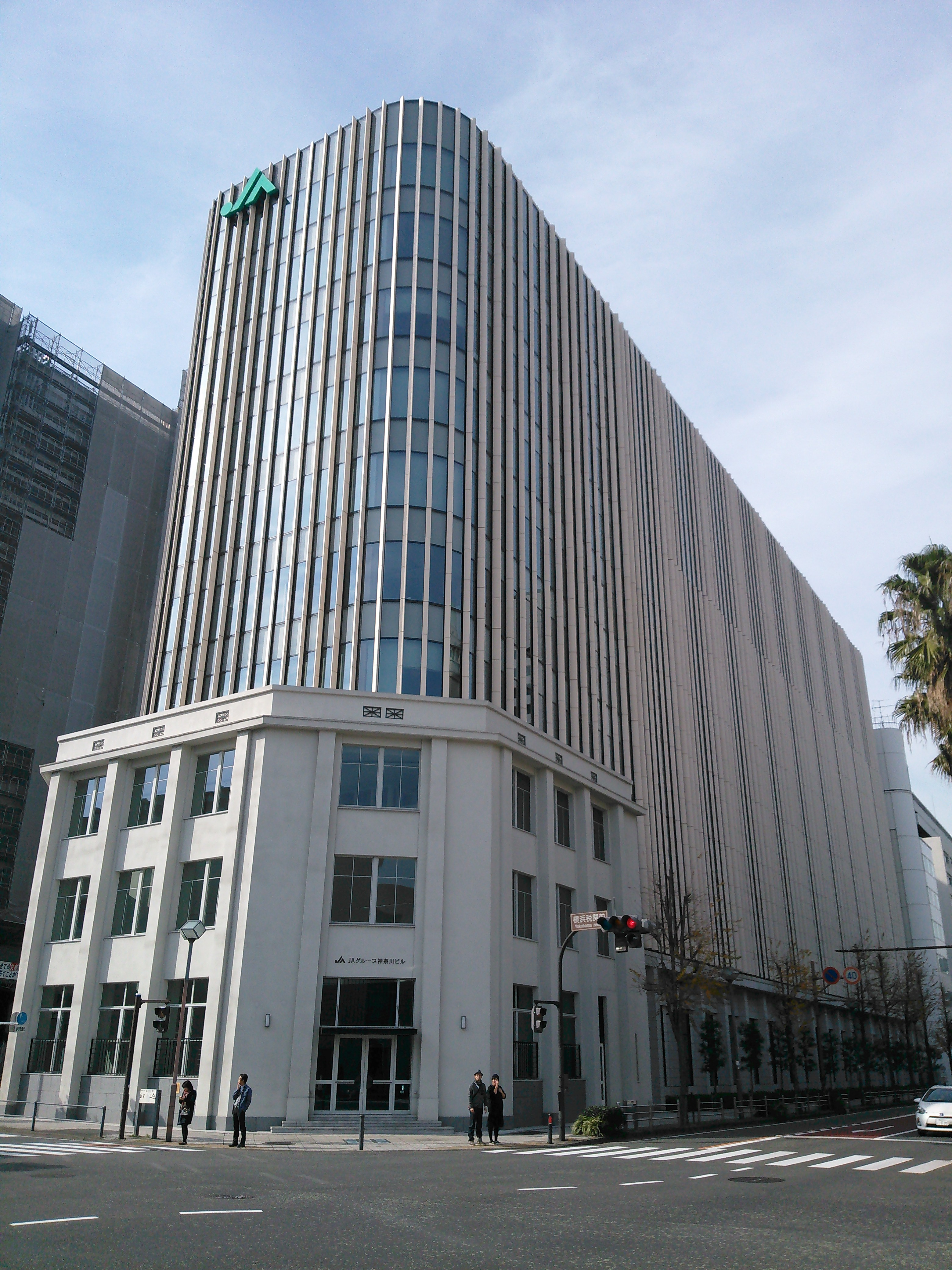 横浜市中区元浜町、JAグループ神奈川ビル